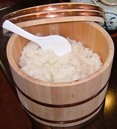 这是Rice in the wooden tub.jpg的衍生作品